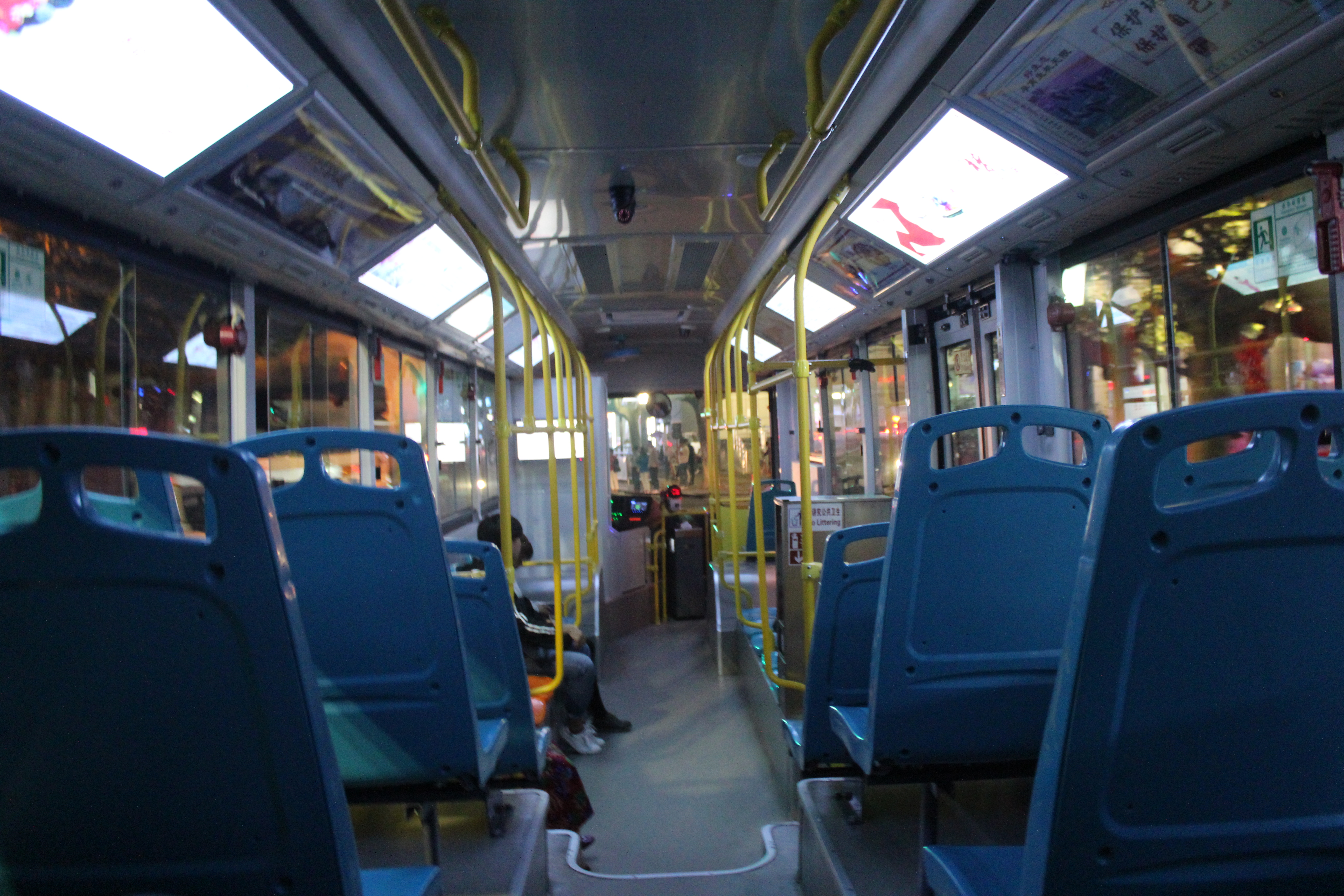 中文（中国大陆）: Bengbu Bus No.105 Interior